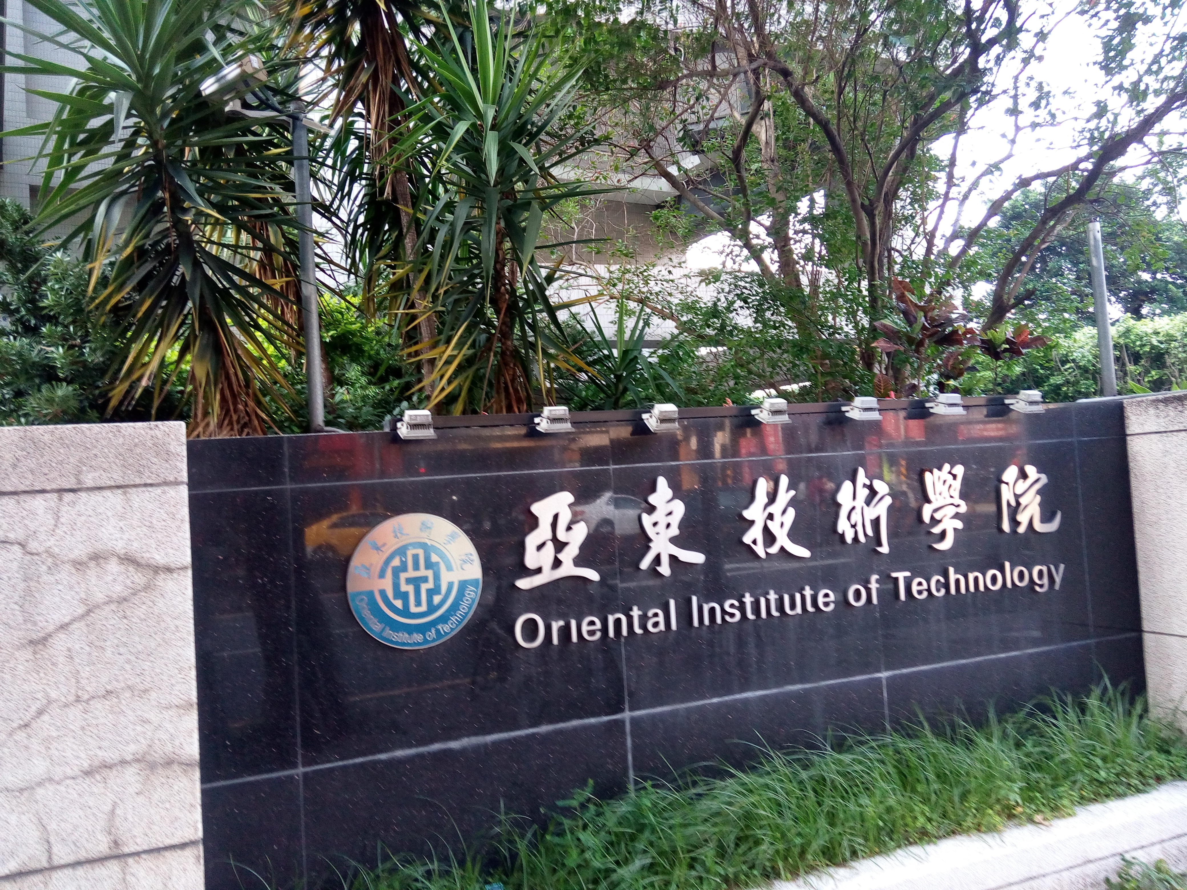 亞東技院，側門校徽。